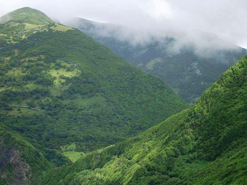 Falesias de acesso à Caldeira de Santo Cristo pelos nortes, Complexo Vulcânico do Topo ilha de São Jorge, Açores, Portugal